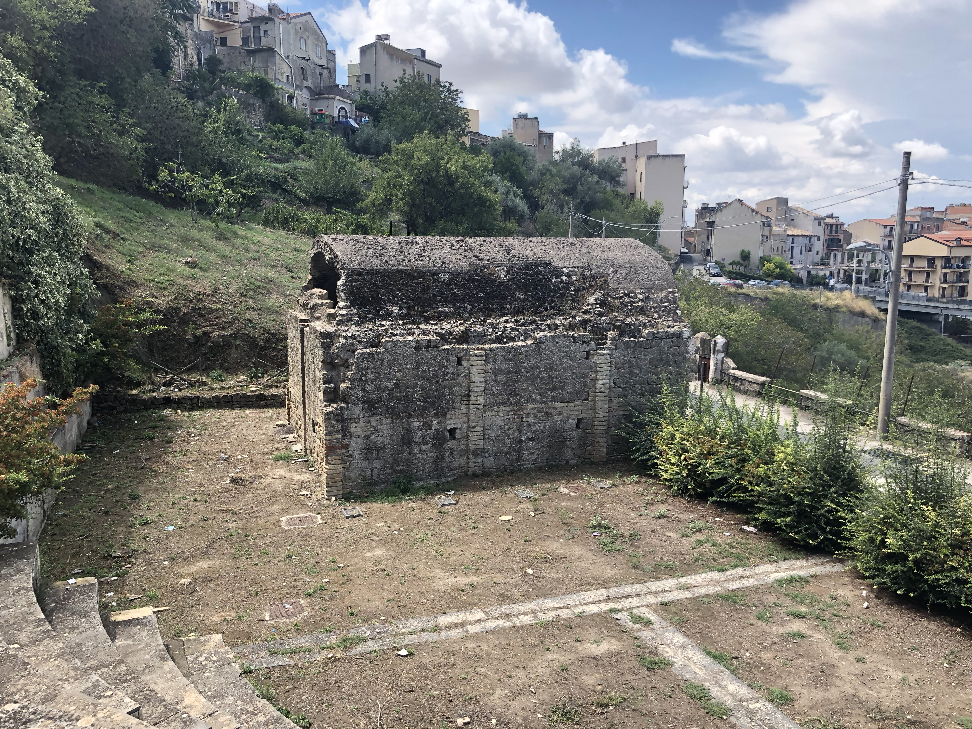 Dogana romana - Centuripe